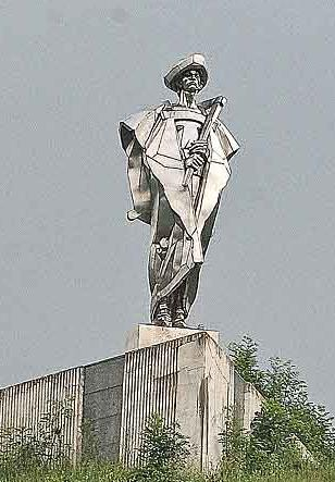 Terchová, Juraj Jánošík's statute from Ján Kulich, 1988, district Žilina, Slovakia Autor:Prazak date:28. 6. 2006